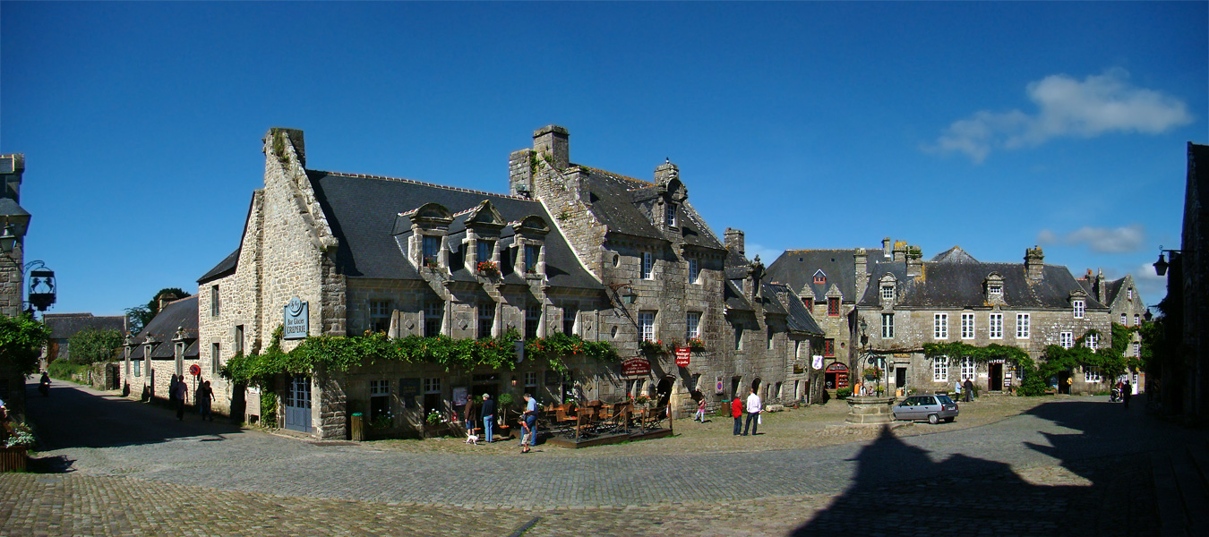 Locronan, Finistère, Bretagne, France. Place de l'Église.